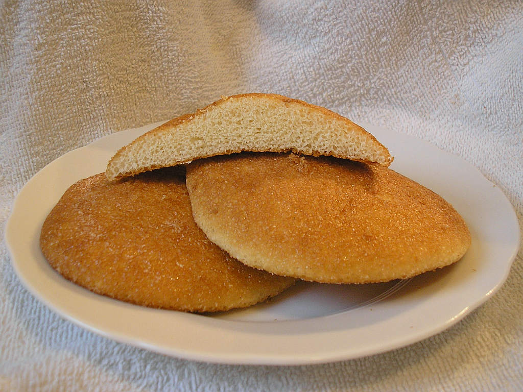 Dutch "eierkoek" ('eggcakes') Location: Netherlands --- nl: Eierkoeken - met doorsnede Locatie: Nederland